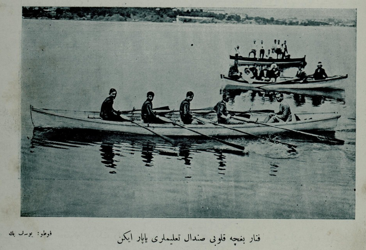 Meşhur Fenerbahçelilerden Galip Bey'in (Kulaksızoğlu) de göründüğü, 15 Haziran 1913 tarihli İdman mecmuasında yer alan fotoğrafın altında şöyle yazıyor : "Fenerbahçe Kulübü sandal talimleri yaparken"